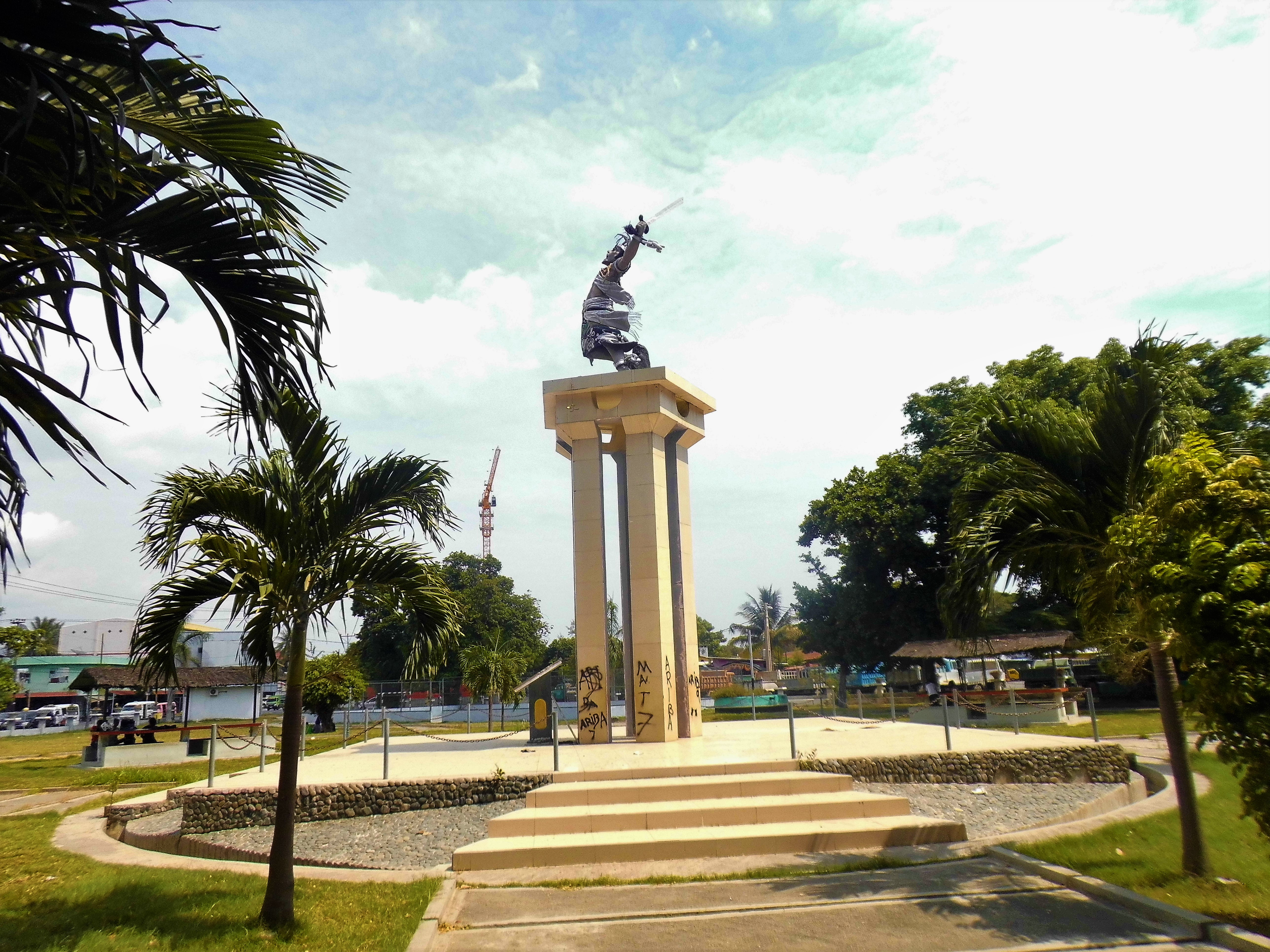 Monumento da Integração, Dili